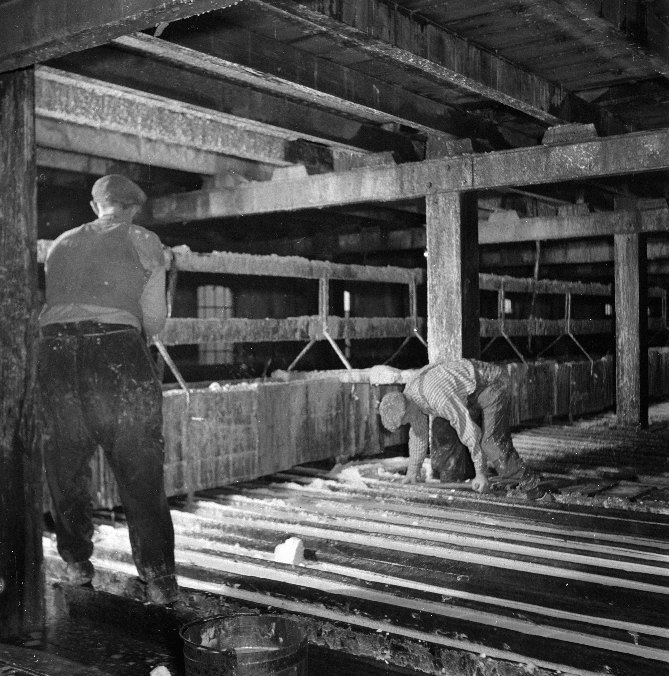 Collectie / Archief : Fotocollectie Anefo Reportage / Serie : [ onbekend ] Beschrijving : Aardappelmeelfabriek Wildervank Datum : 2 januari 1946 Locatie : Groningen, Wildervank Trefwoorden : fabrieken Fotograaf : Breijer, Charles / Anefo Auteursrechthebbende : Nationaal Archief Materiaalsoort : Negatief (zwart/wit) Nummer archiefinventaris : bekijk toegang 2.24.01.03 Bestanddeelnummer : 901-3281